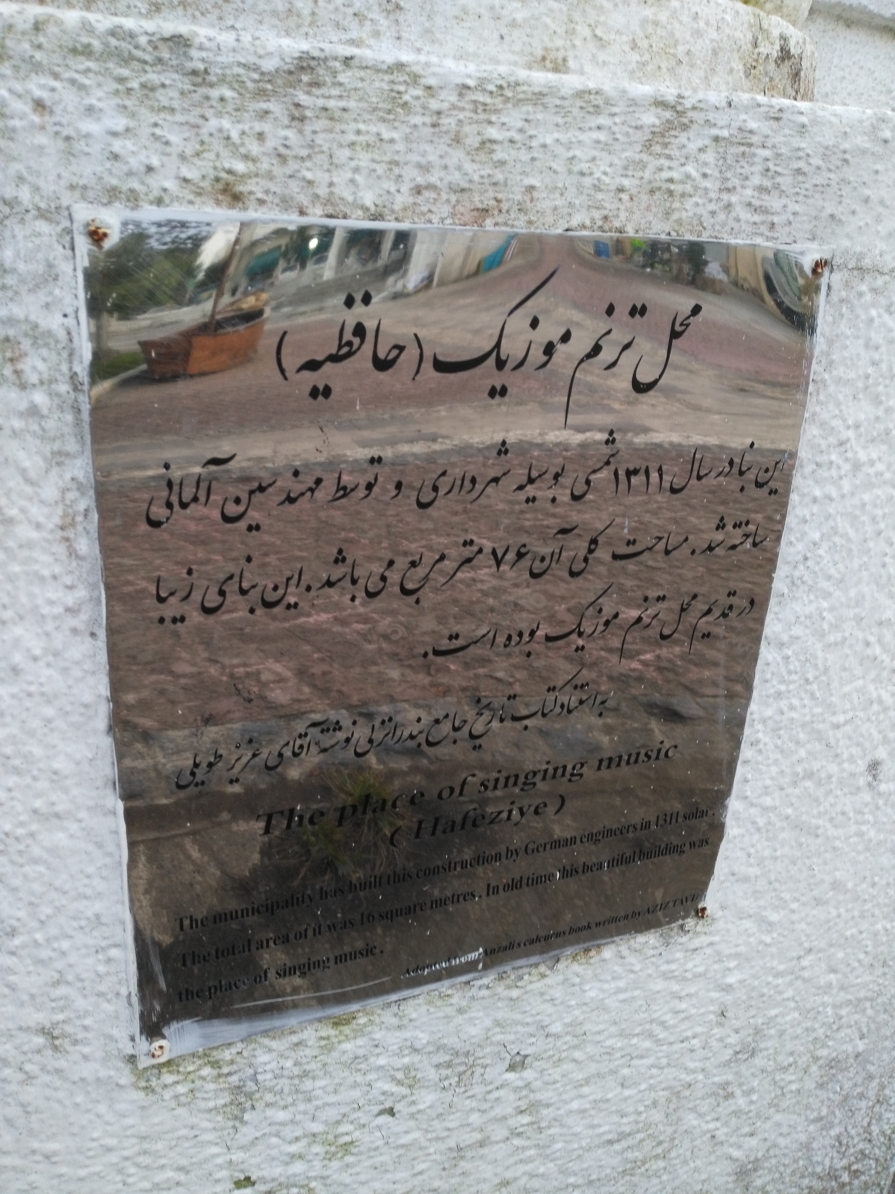 ساختمان موزیک (حافظیه)، انزلی، گیلان، ایران